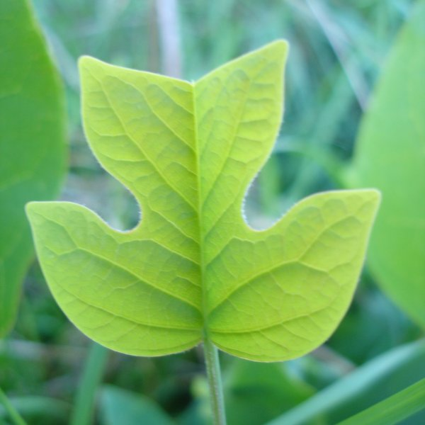 Jeune feuille de tulipier de Virginie au mois d'août, région de Vichy (Auvergne, France)